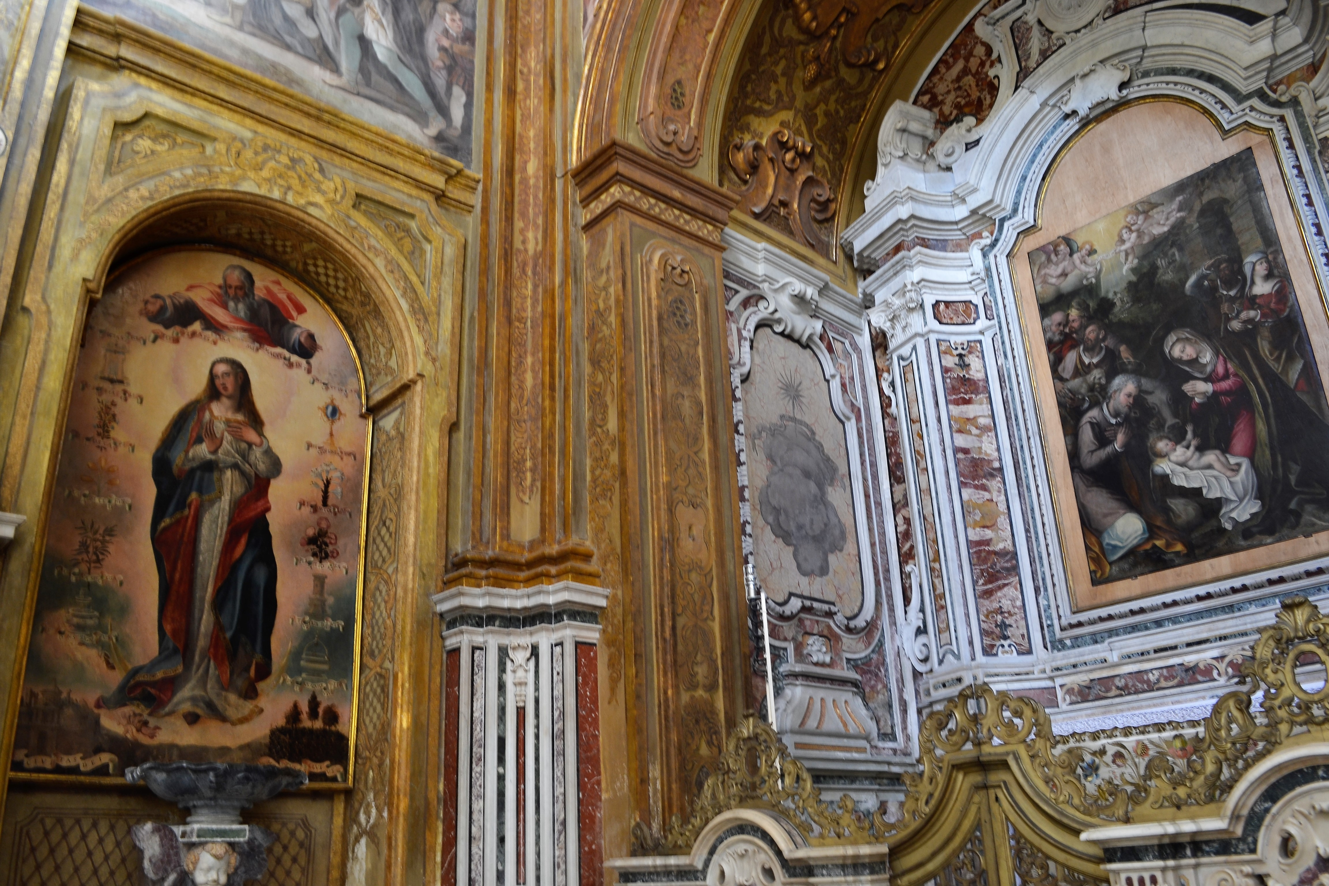 Chiesa di San Gregorio Armeno di Napoli - Scorcio della prima cappella di sinistra e della cappellina sulla controfacciata di sinistra. A sinistra l'Immacolata di Silvestro Buono A destra l'Adorazione dei pastori di Pompeo Landulfo